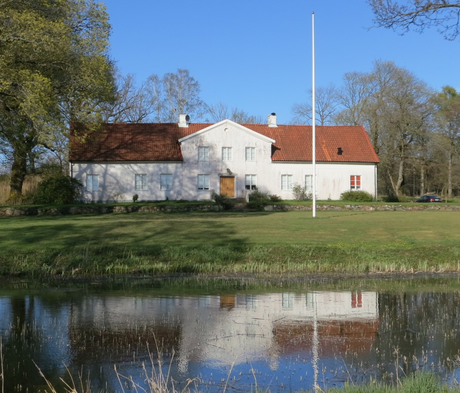 Ettarps gård, Halmstads kommun